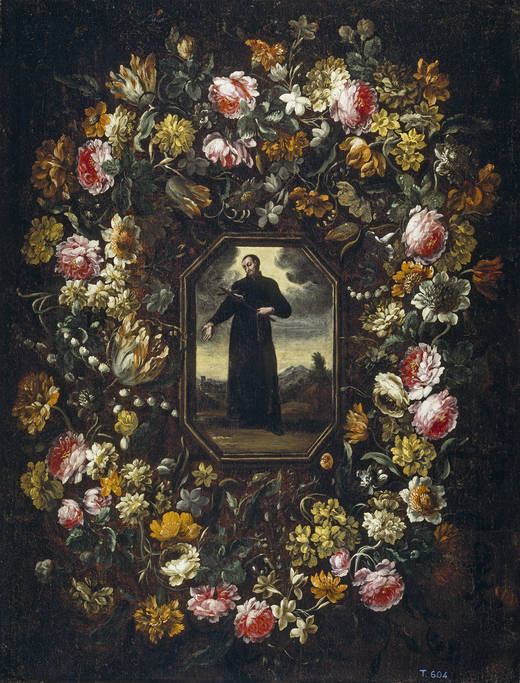 Guirnalda de flores con San Francisco de Borja